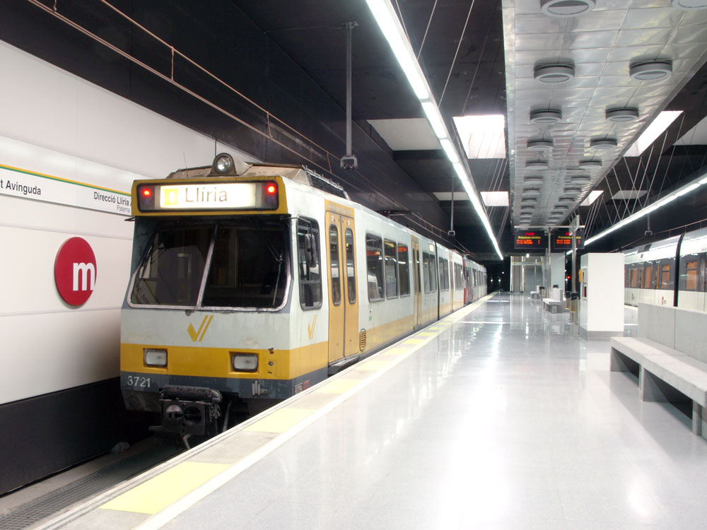 Stadtbahnwagen der Linie 1 in der Station Torrent Avinguda in Valencia, Spanien